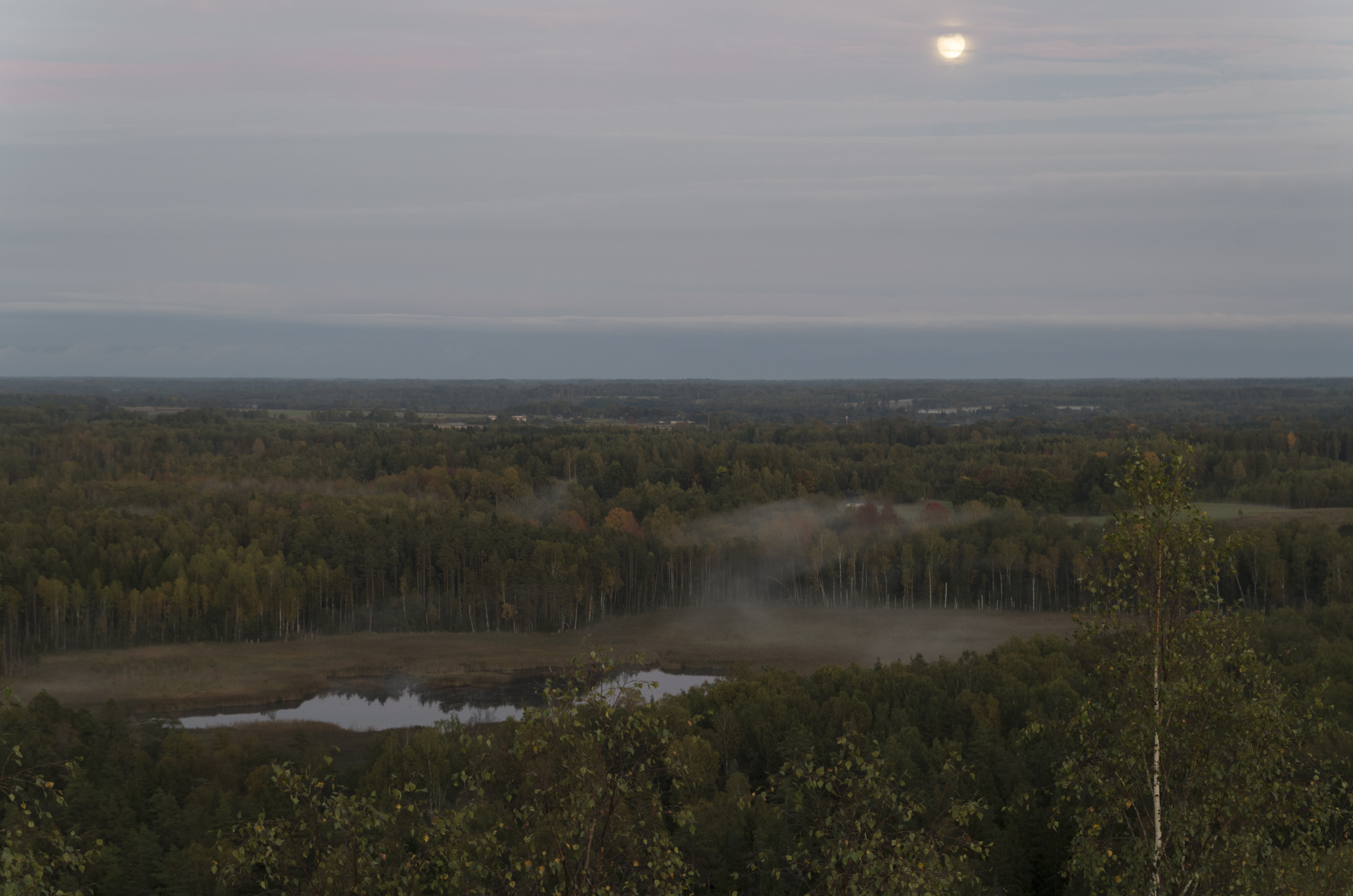 Krustkalnu rezervāts